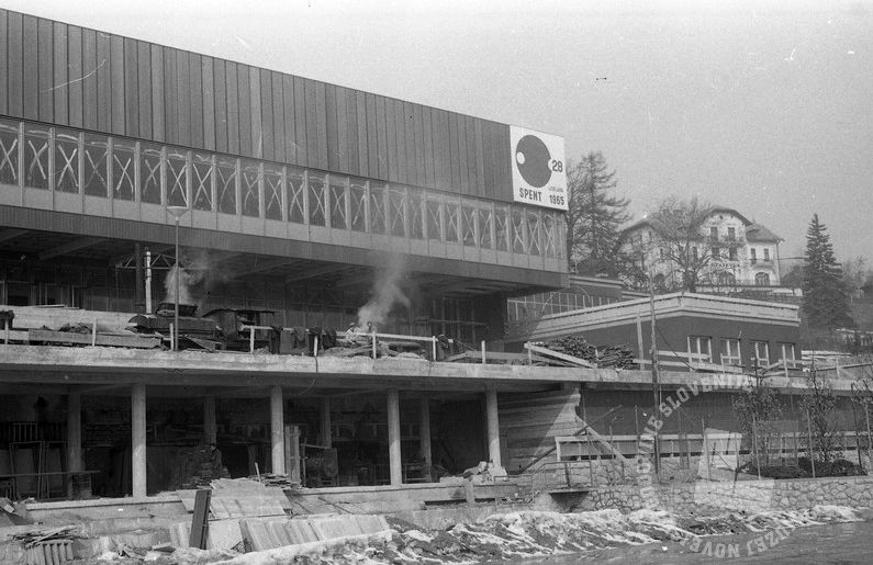 Dela pri gradnji nove športne hale v parku inž. Stanka Bloudka.